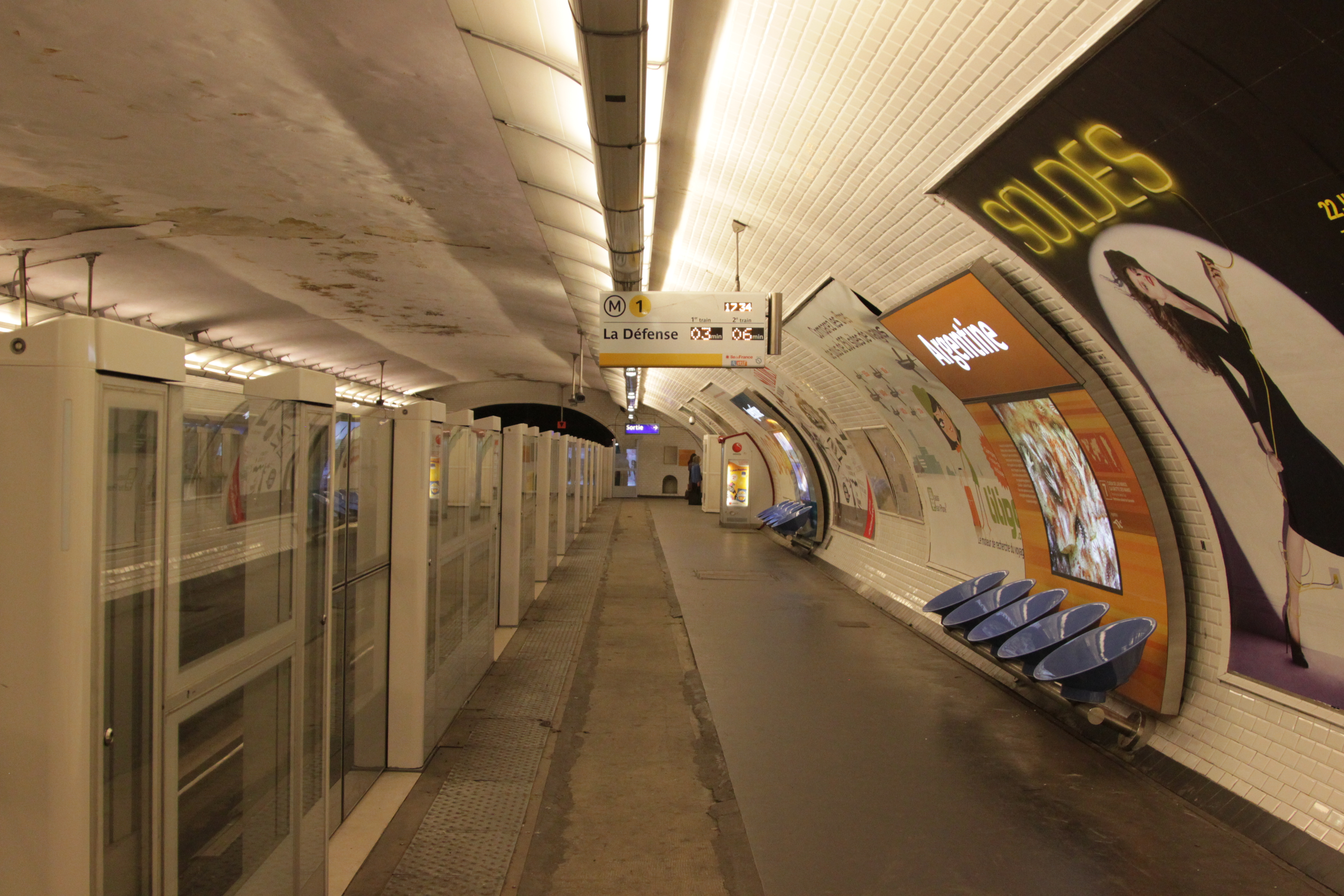 Station Argentine sur la ligne 1 du métro de Paris.